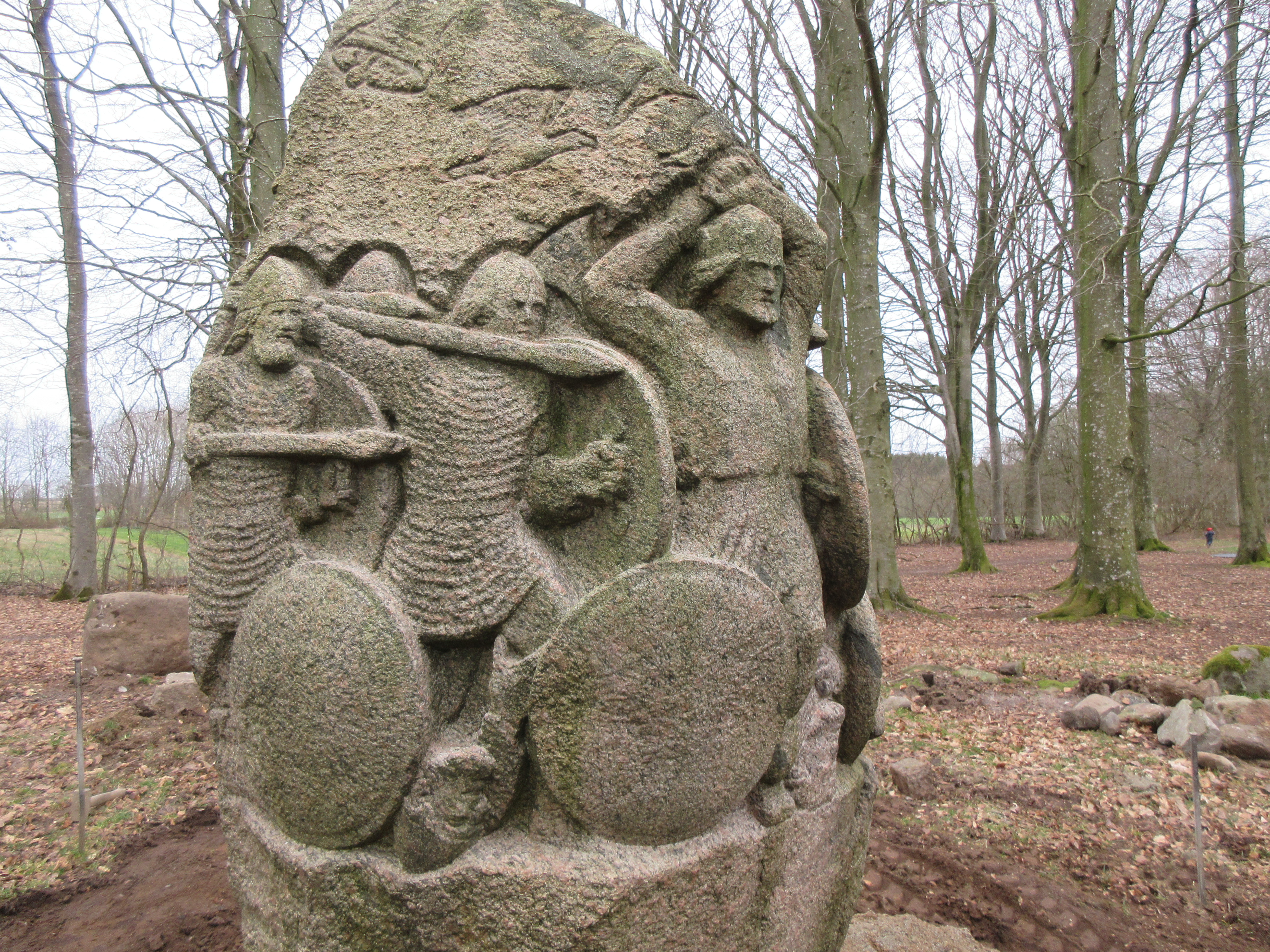 Magnusstenen i Skibelund Krat udført af den danske billedhugger og maler Niels Skovgaard til minde om Magnus den Godes sejr i slaget på Lyrskov Hede i 1043